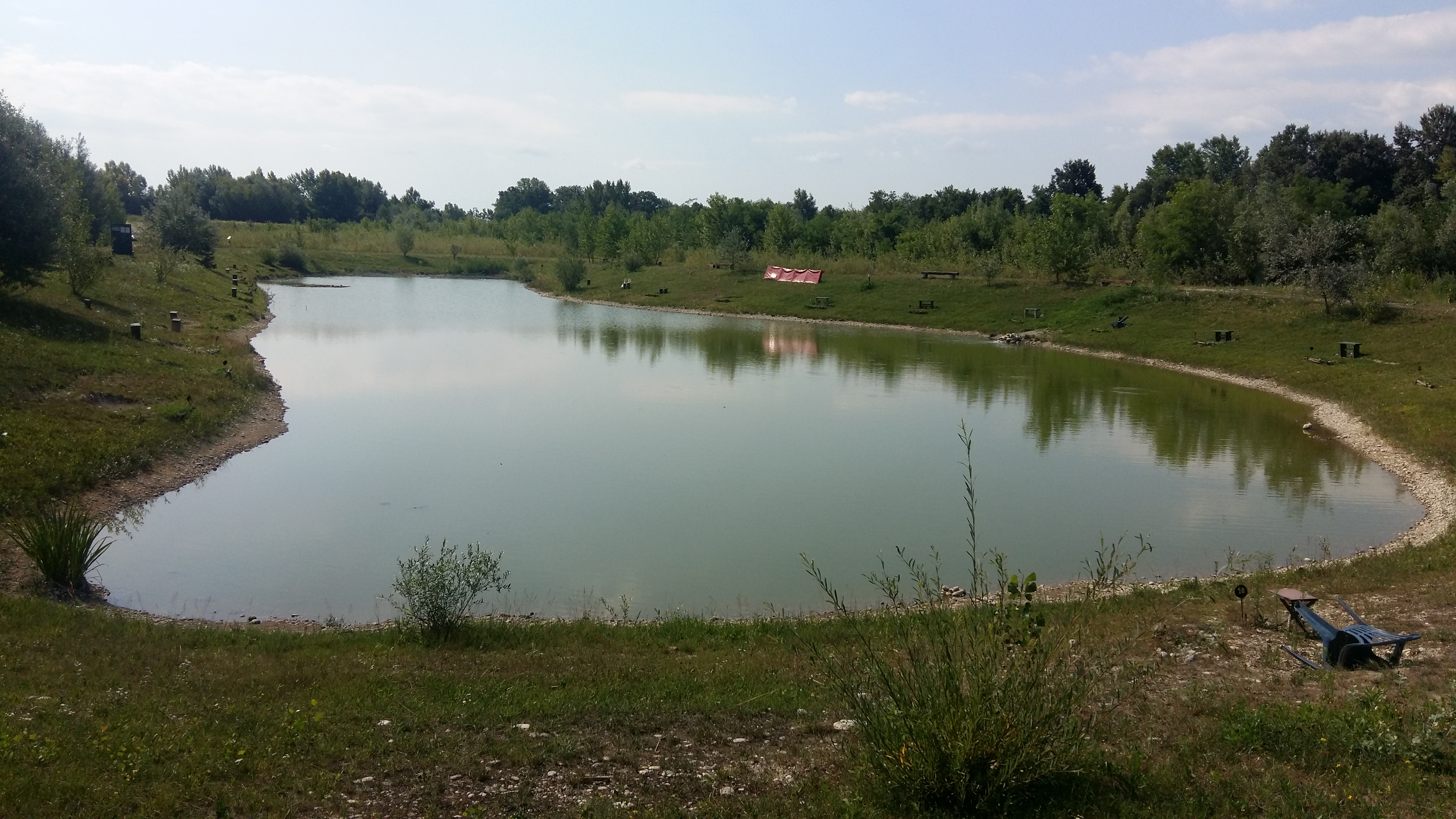 Hajdoše